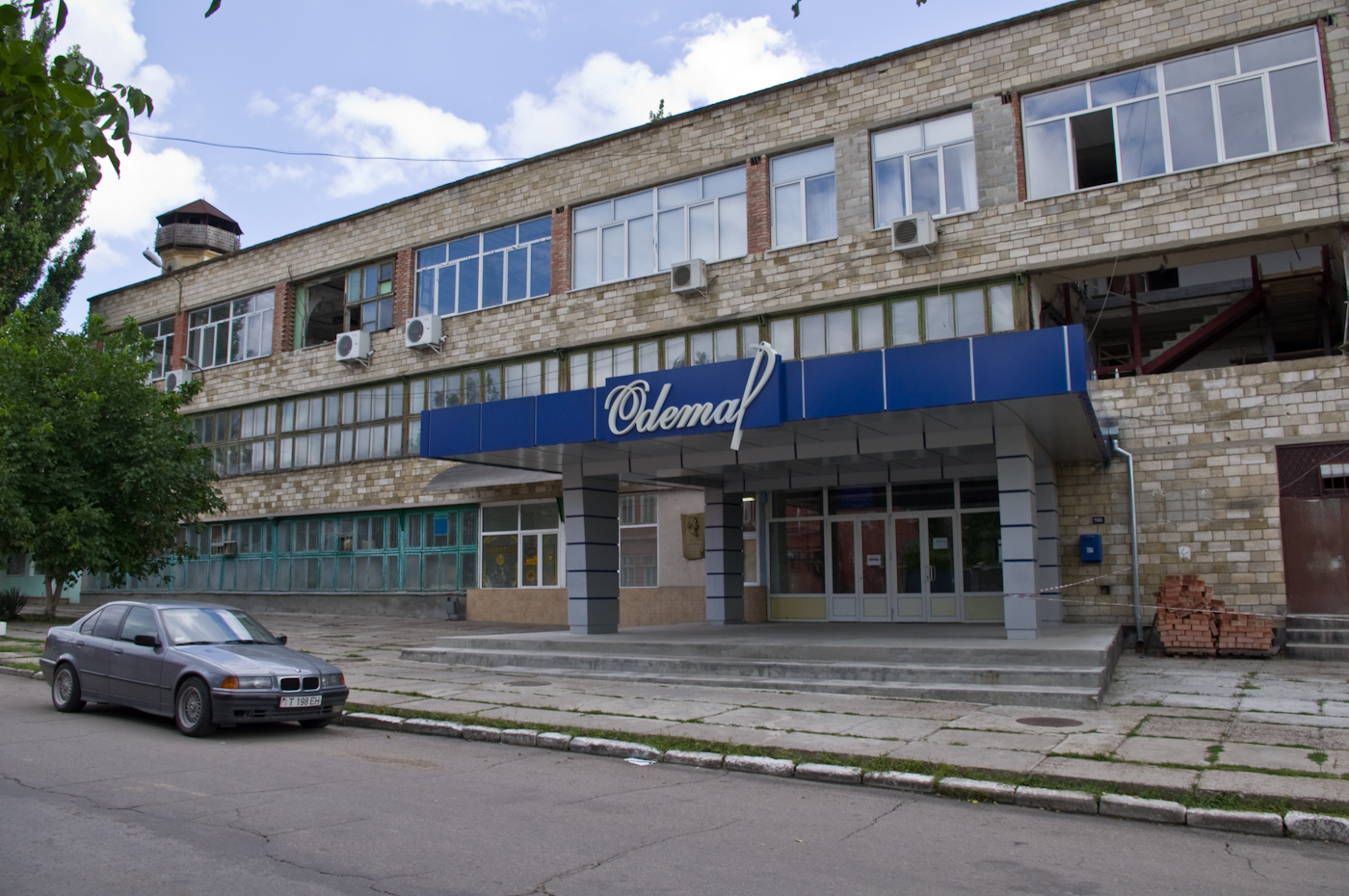 Фабрика "Одема". Центральный вход ремонтируется.